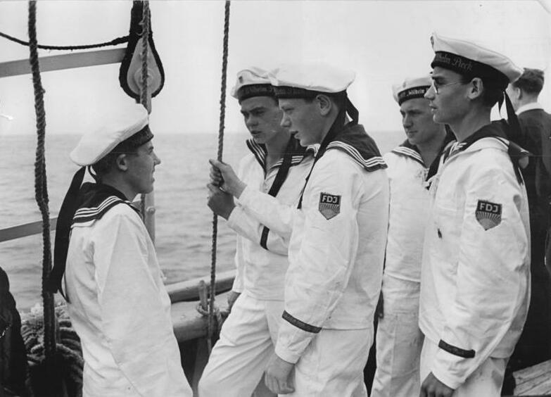 Warnemünde, Segelschulschiff "Wilhelm Pieck", Indienststellung Illus Heilig 3.8.151 FDJ-Schulschiff in Dienst gestellt. In Anwesenheit des Präsidenten Wilhelm Pieck wurde am 2.8.51 das erste Schulschiff der Freien Deutschen Jugend, das den Namen "Wilhelm Pieck" trägt, in Warnemünde in Dienst gestellt. Eine Gruppe der jungen Schiffsbesatzung.